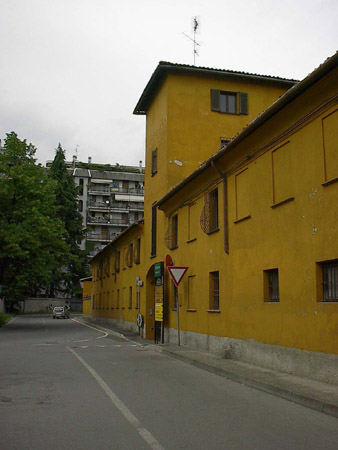 Cascina Guzzina